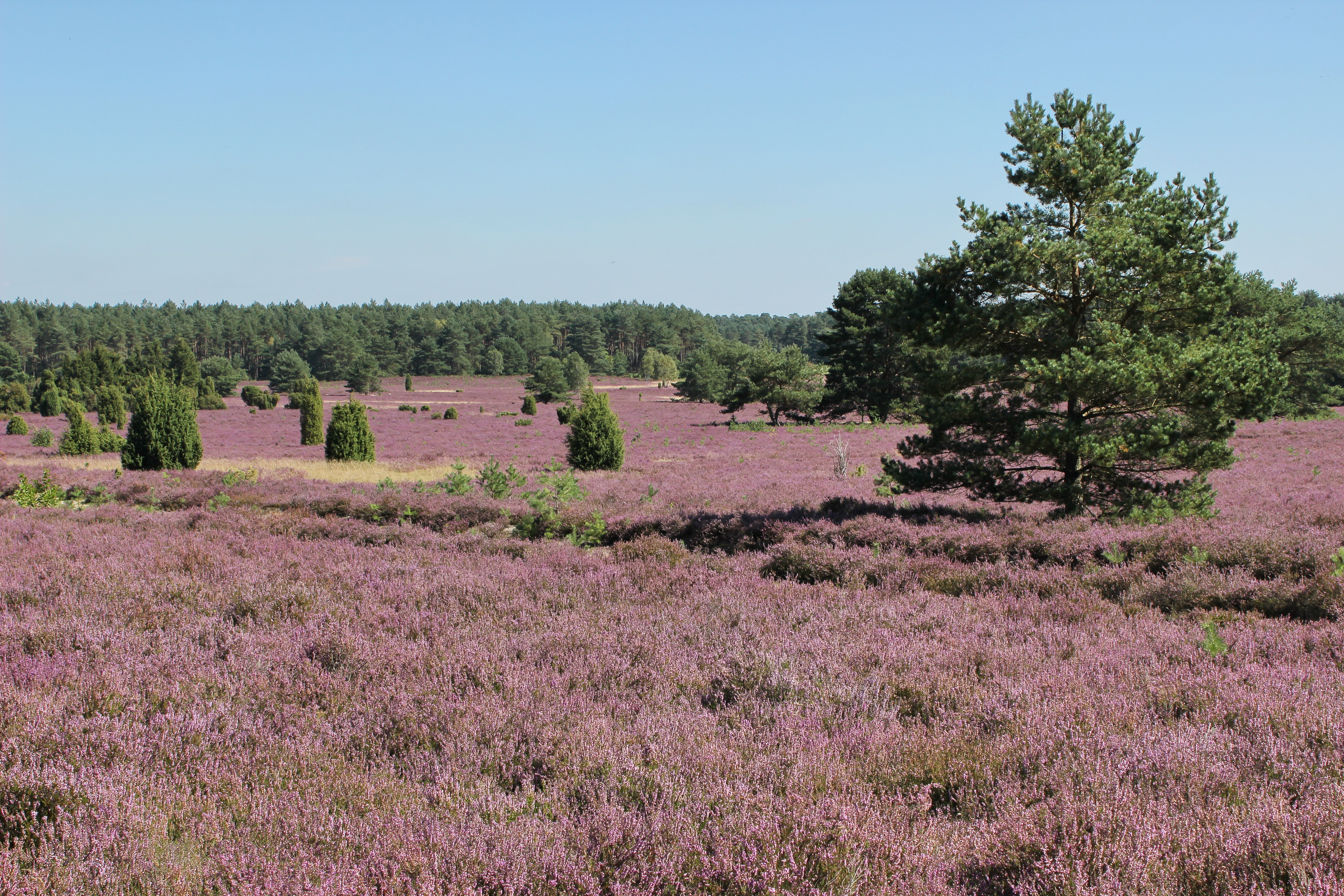 FFH-Gebiet Heiden und Magerrasen in der Südheide: Hier sieht man die für dieses FFH-Gebiet typische wellige Geestlandschaft mit ausgedehnten Sandheiden und Wacholdergebüschen. Im Bildhintergrund wird die Heidefläche von Wald begrenzt. Der fotografierte Ausschnitt des FFH-Gebietes liegt im Naturpark Südheide und im Landschaftsschutzgebiet Südheide.